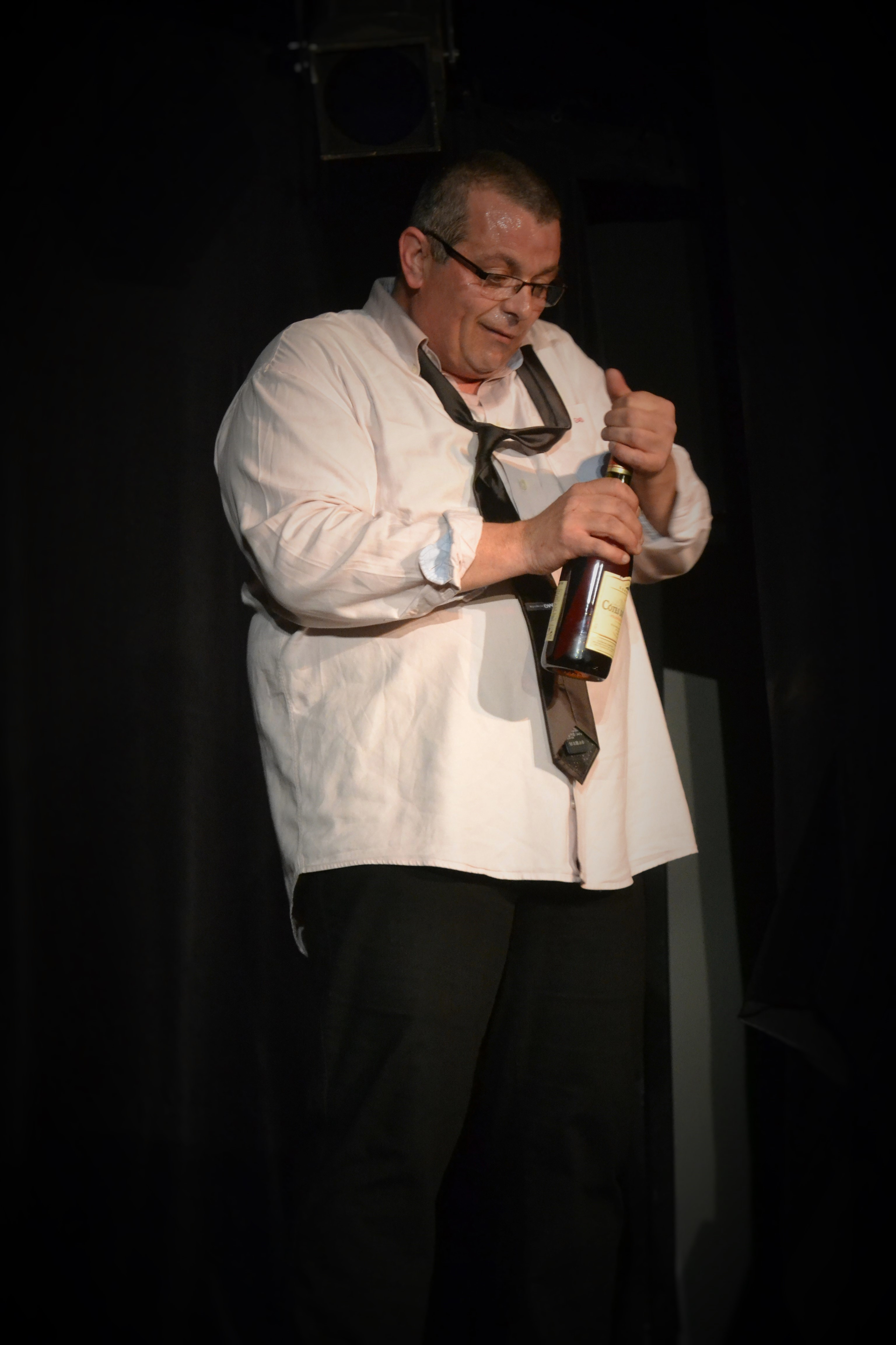 Eric Collado sur scène en 2014